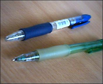 Pencils